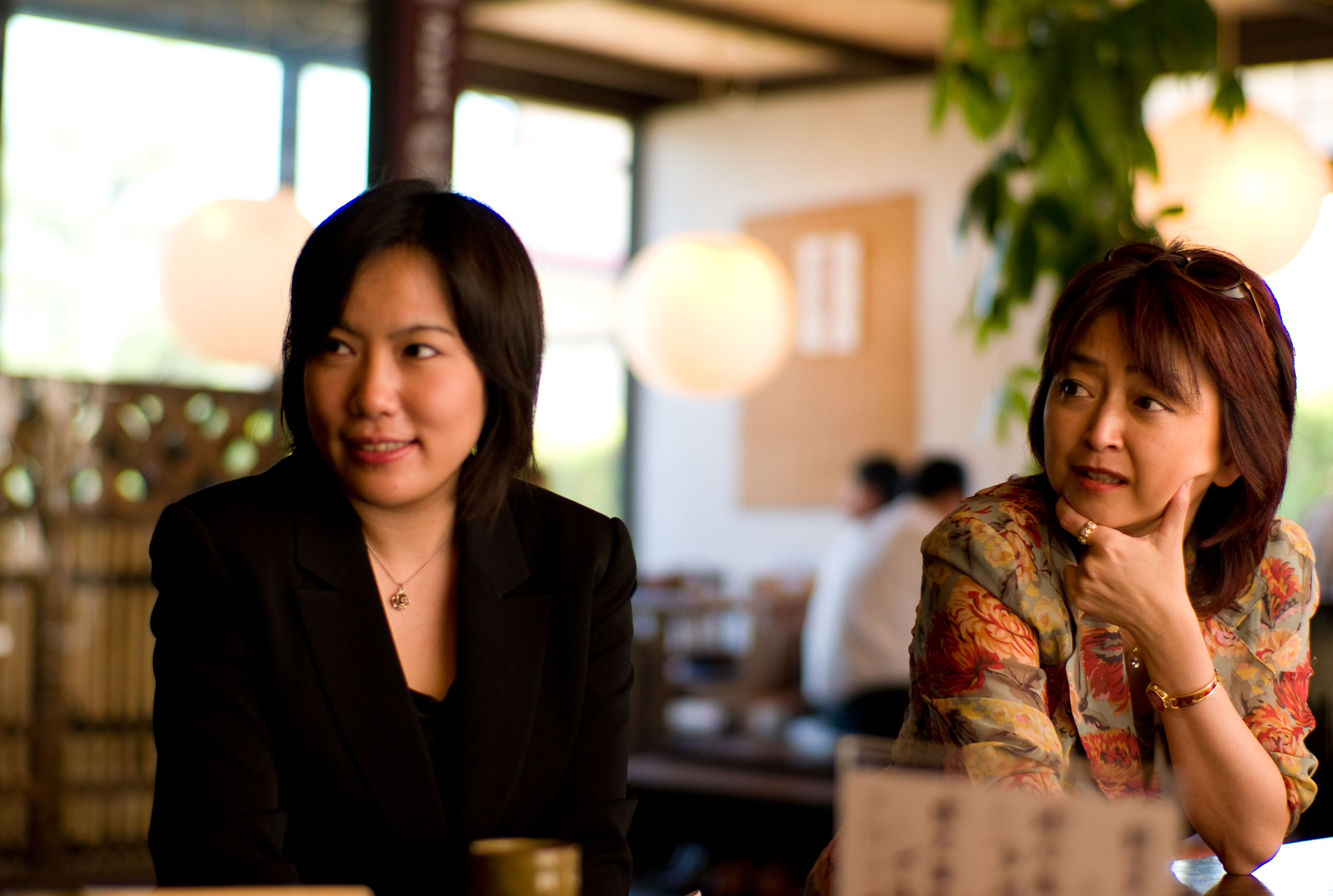 ja:%e7%a7%8b%e5%b0%be%e6%b2™%e6ˆ%b8%e5%ad |ja Wikipedia article